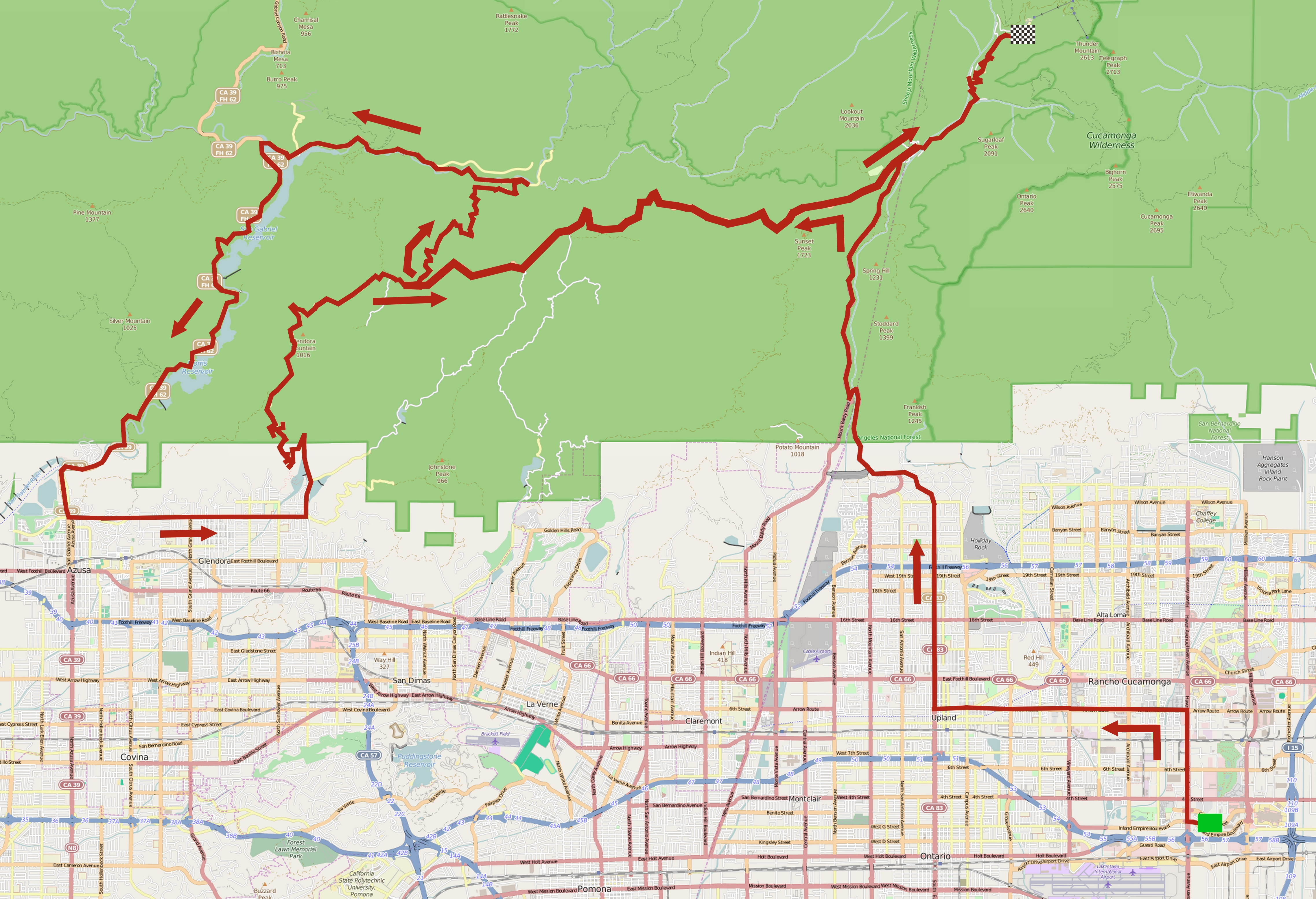 Parcours de la septième étape du Tour de Californie 2015. This map may be incomplete, and may contain errors. Don't rely solely on it for navigation.